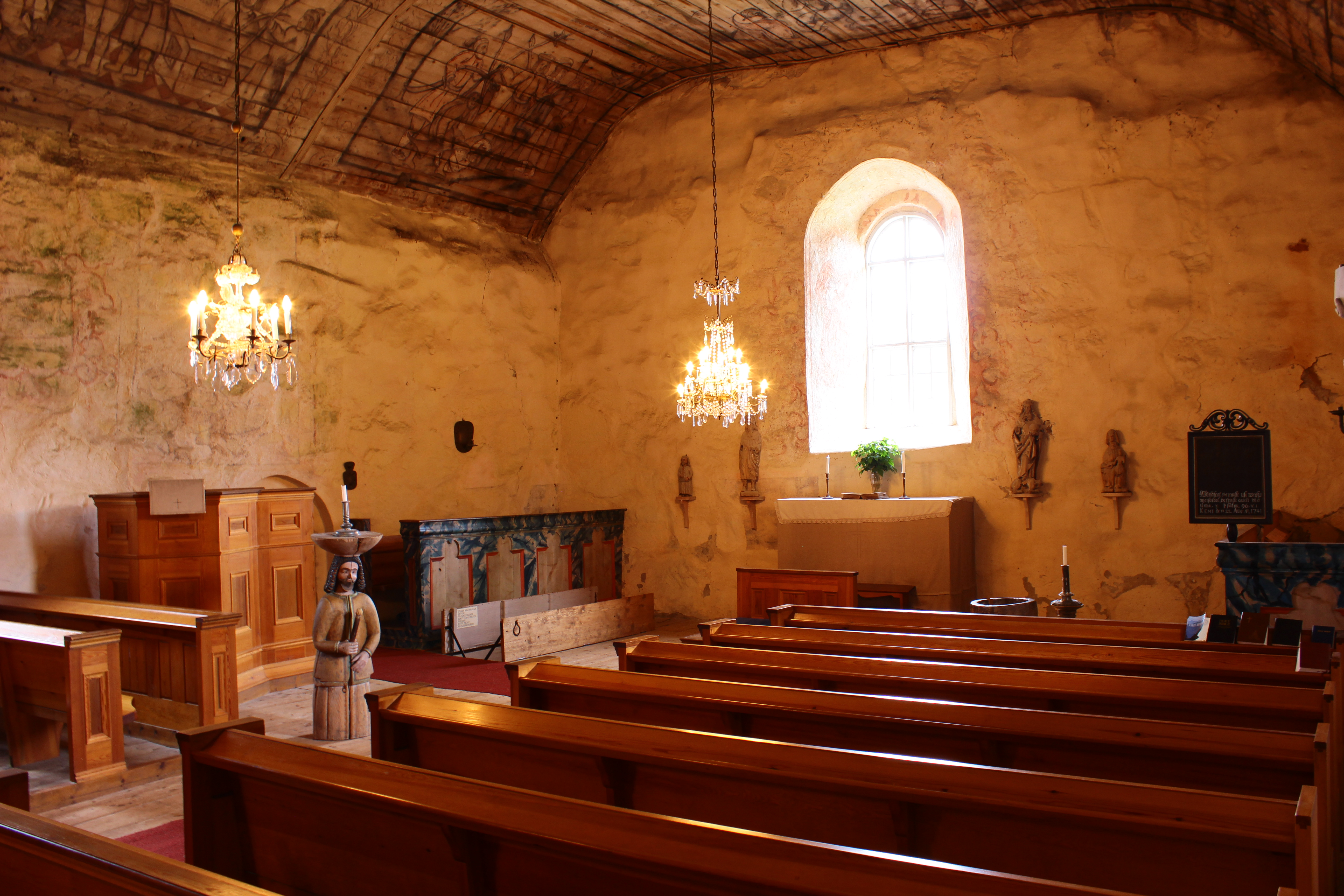 Keminmaan vanhan kirkon interiööri.